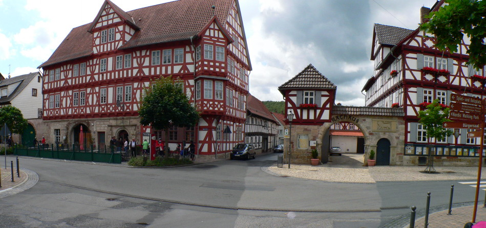 Deutschland, Hessen: Wanfried Rathaus